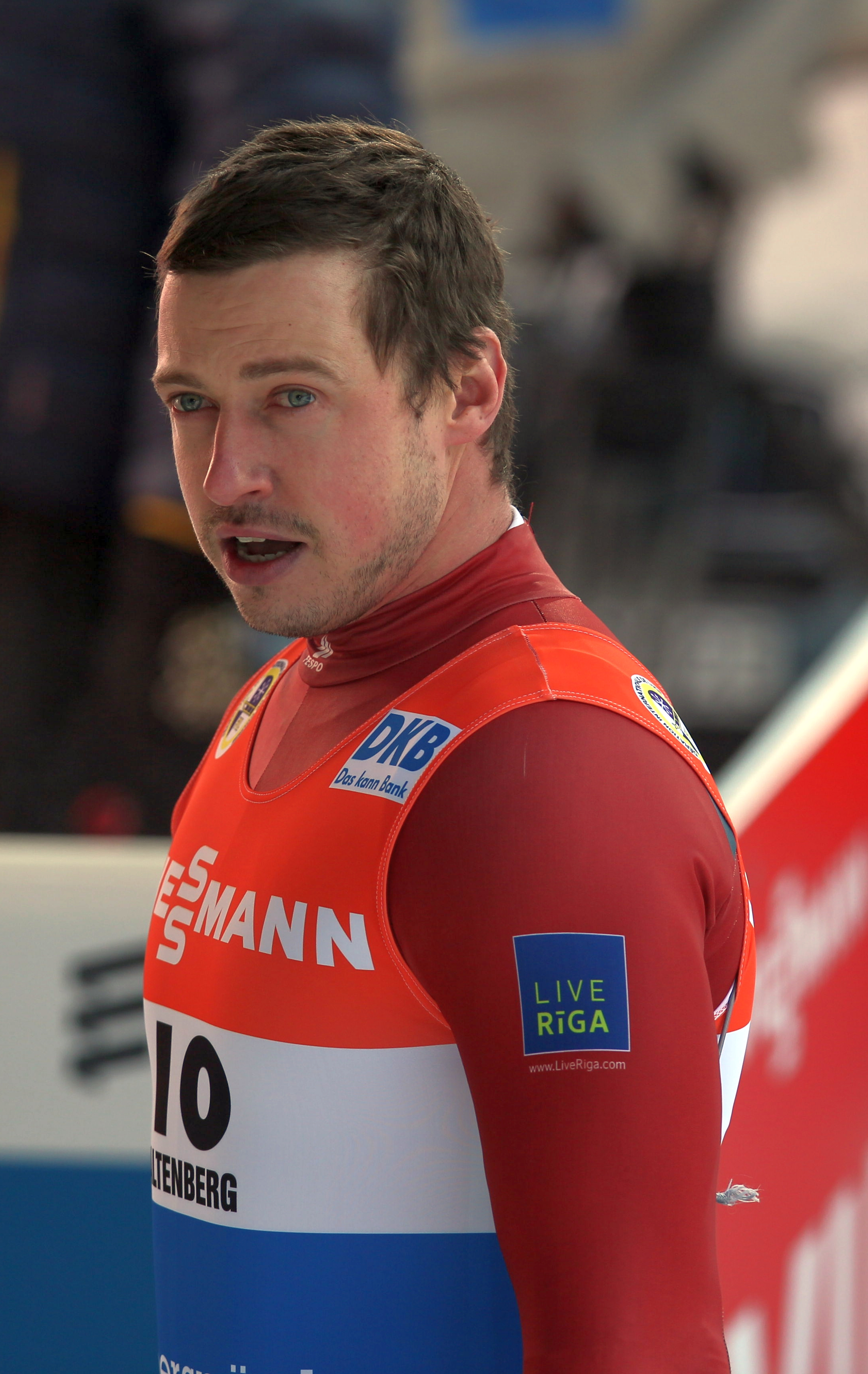 Andris Sics beim Rennrodel-Weltcup der Doppelsitzer in Altenberg 2017